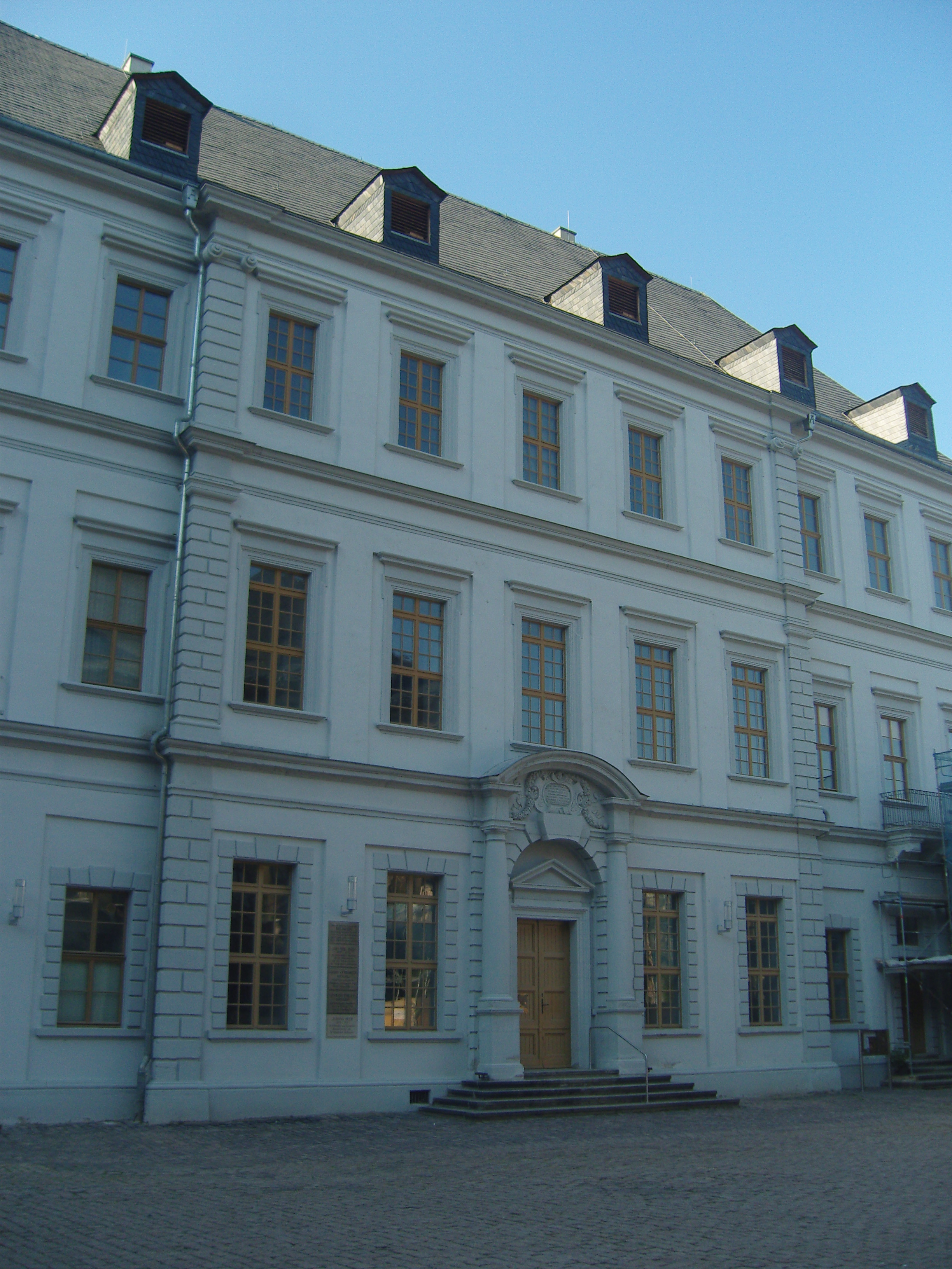 Kapelle Schloss Neu-Augustusburg in Weißenfels